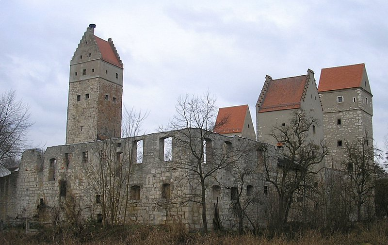 Burg Nassenfels (Landkreis Eichstätt, Oberbayern). Gesamtansicht von Südosten. Eigene Aufnahme, Dez. 2006 / Nassenfels castle between Neuburg and Eichstätt (Upper Bavaria, Germany). Total view from the south-east. Own photo, Dec. 2006.